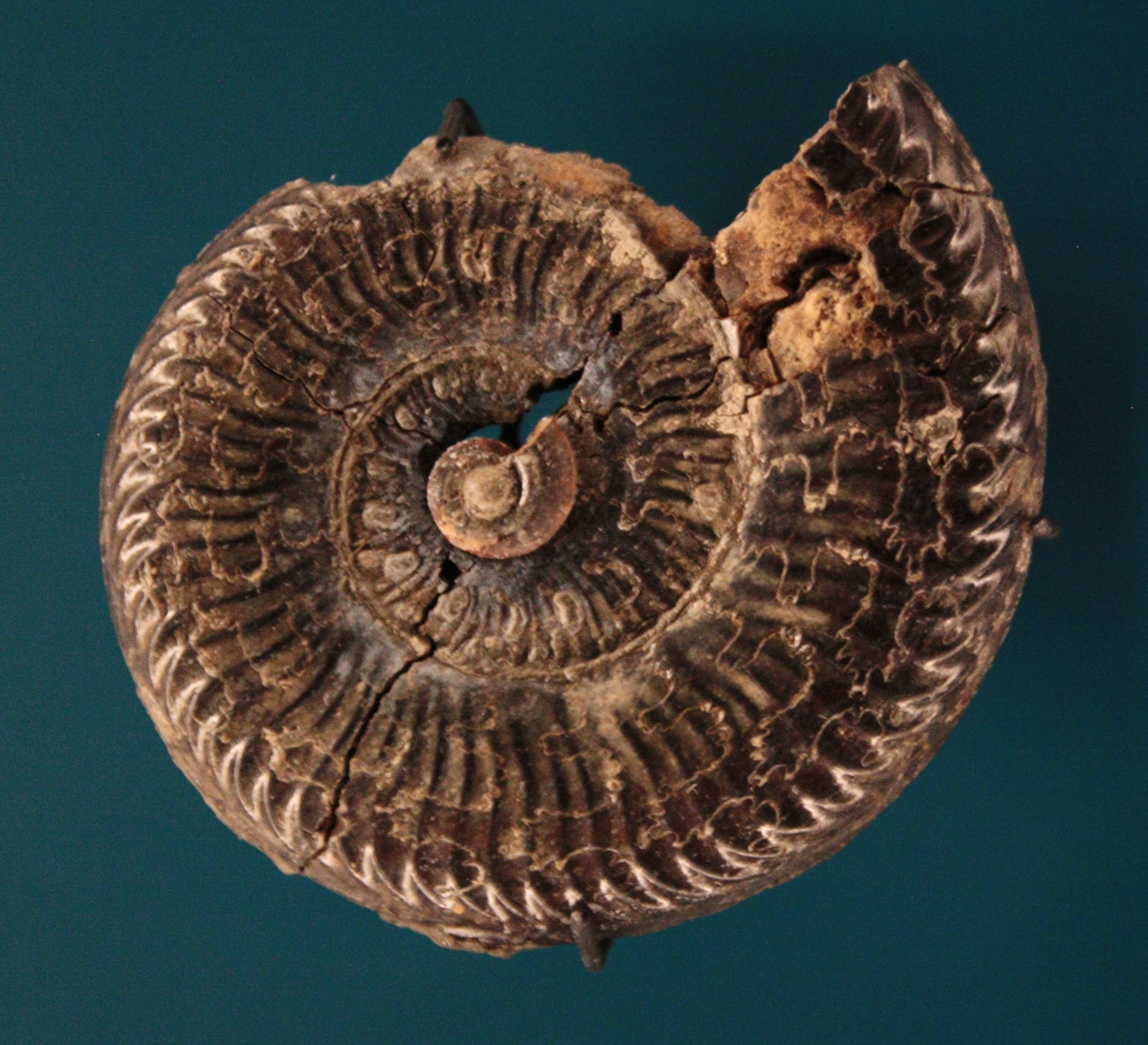 Ammonite du Toarcien moyen. Musée de Lodève.